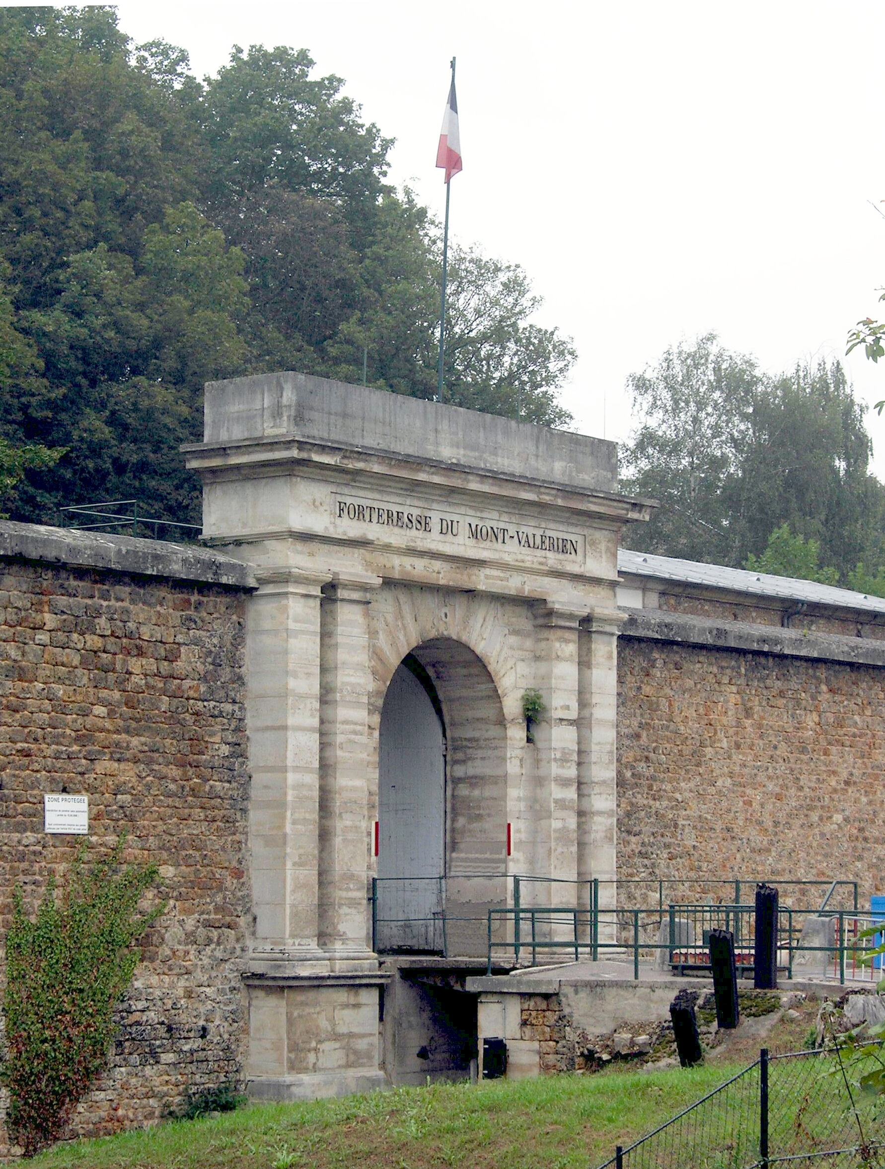 Description =Entrée du fort du mont Valérien à Suresnes *Source =Photo taken by Remi Jouan *Date =Novembre 2005 *Author =Remi Jouan